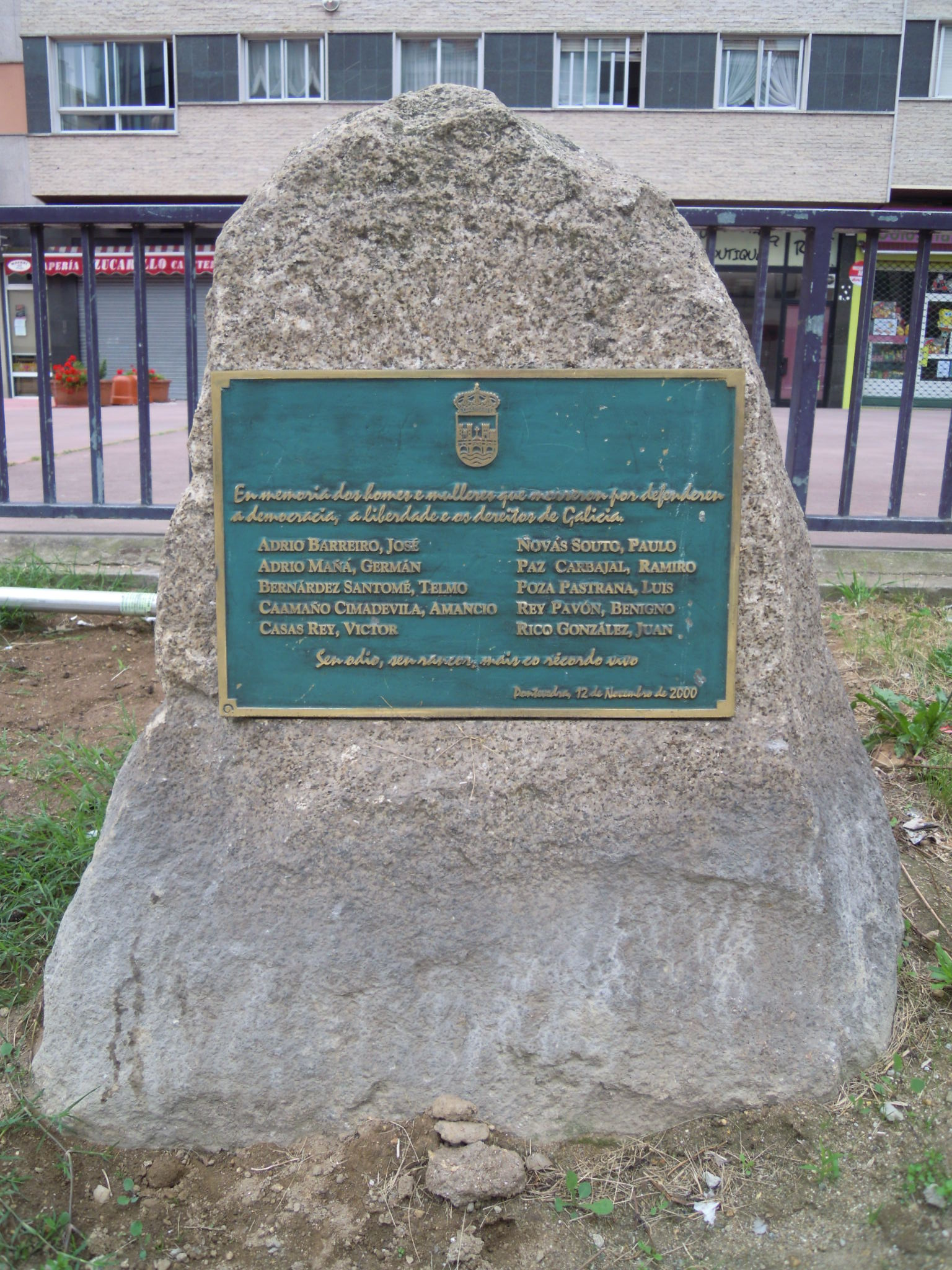 Placa na rúa gl:12 de novembro no barrio da Eiriña de Pontevedra, homenaxe aos fusilados na Caeira (Poio) en gl:1936, coa seguinte inscrición:En memoria dos homes e mulleres que morreron por defenderen a democracia, a liberdade e os dereitos de Galicia Sen odio, sen rancor, mais co recordo vivo.Pontevedra, 12 de novembro de 2000.